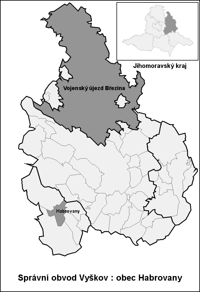 Hranice Habrovany (Vyškov- Czech republic)